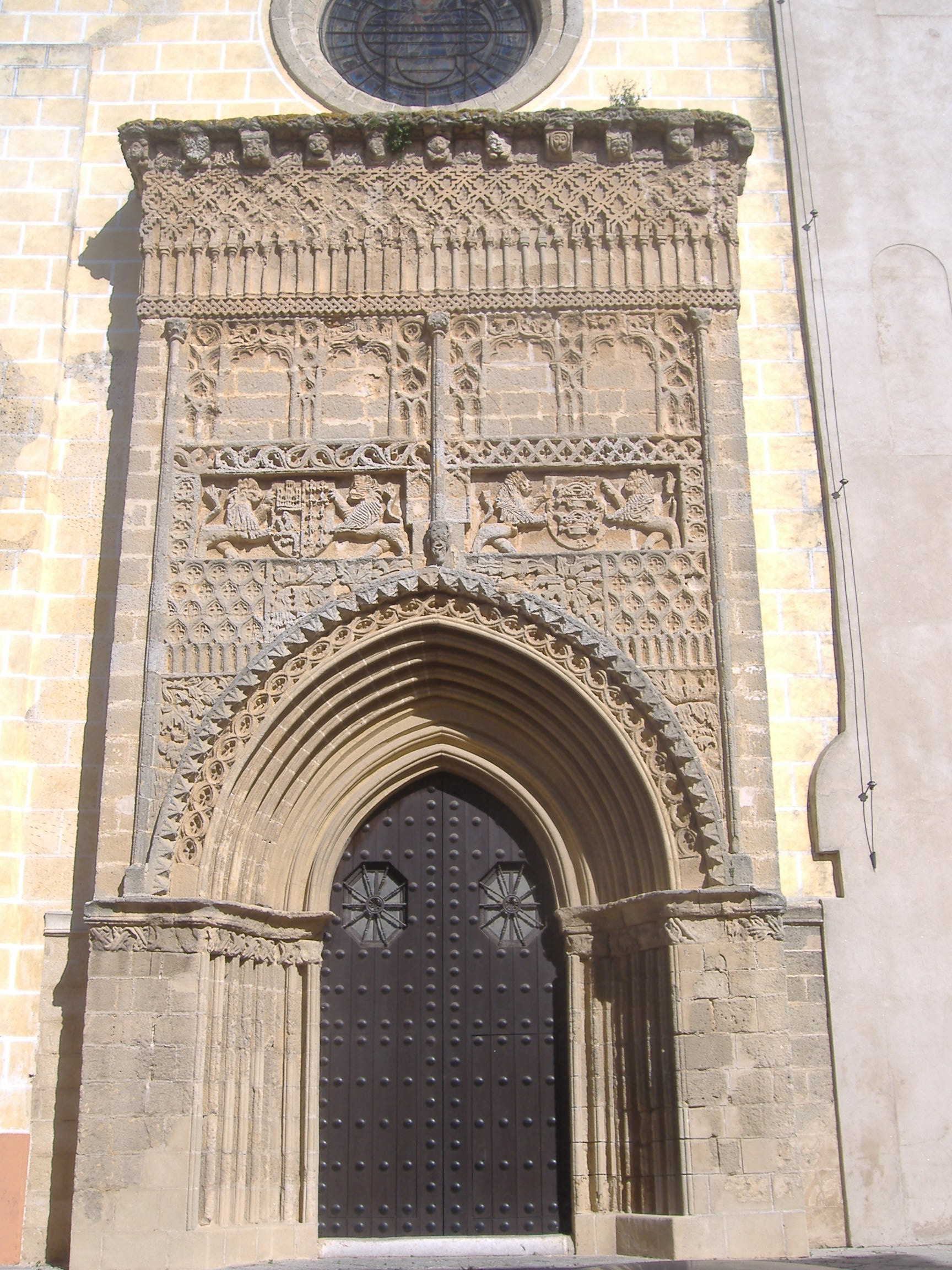 Sanlúcar Barrameda. Iglesia de la O. Portada mudéjar